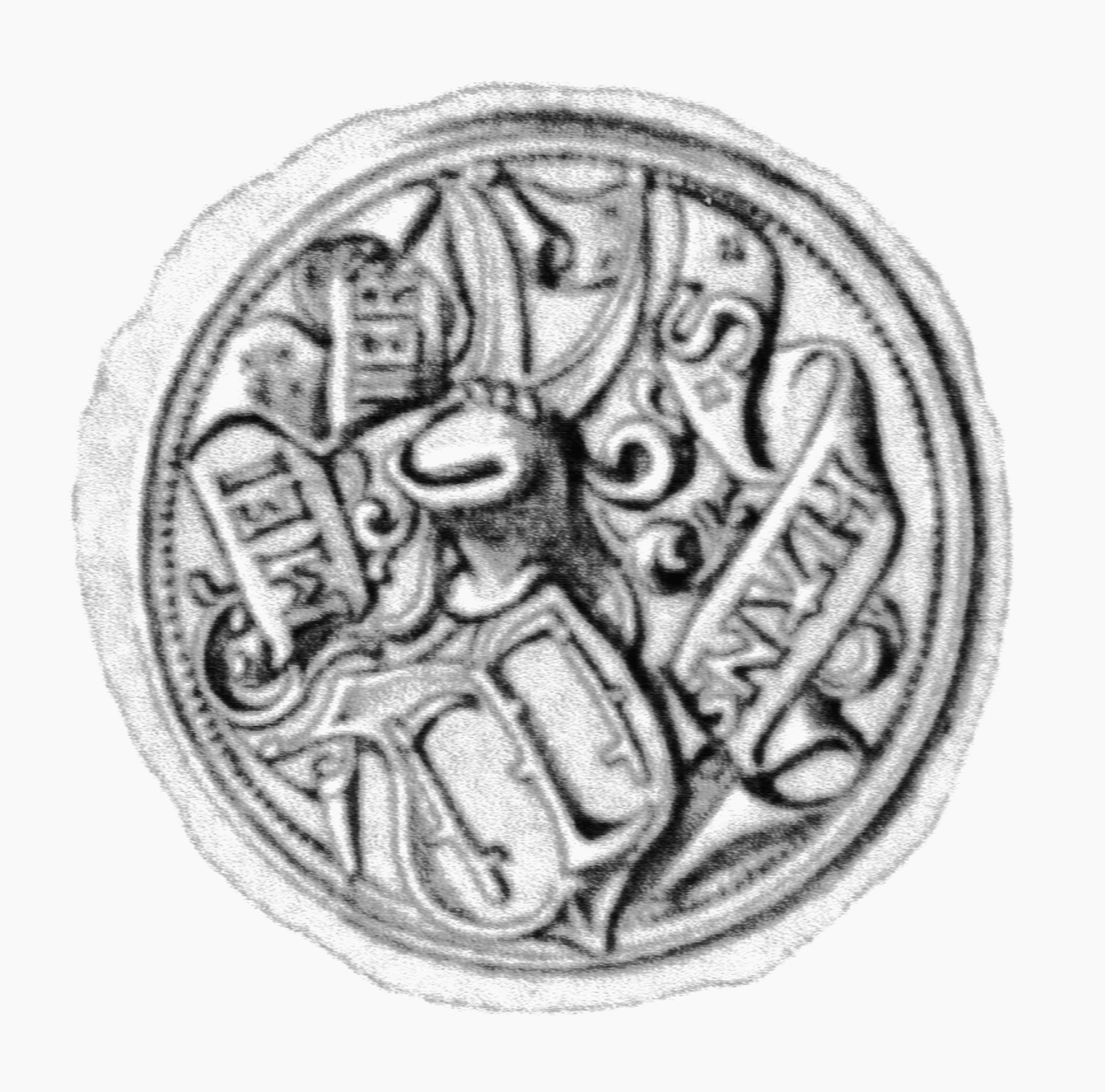 Siegel des Ratsmannes Johann Meyer. Das Siegel stammt aus der Zeit um 1516. Siehe Emil Ferdinand Fehling: Lübeckische Ratslinie, Nr. 587 (Johann Meyer).